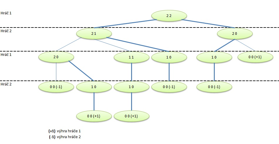 Rozšířená forma hry - hra NIM Modifikace příkladu z publikace: DLOUHÝ, Martin; FIALA, Petr. Úvod do teorie her. 2.přepracované vydání. Vysoká škola ekonomická v Praze : Nakladatelství Oeconomica, 2009. 120 s. ISBN 978-80-245-1609-7.